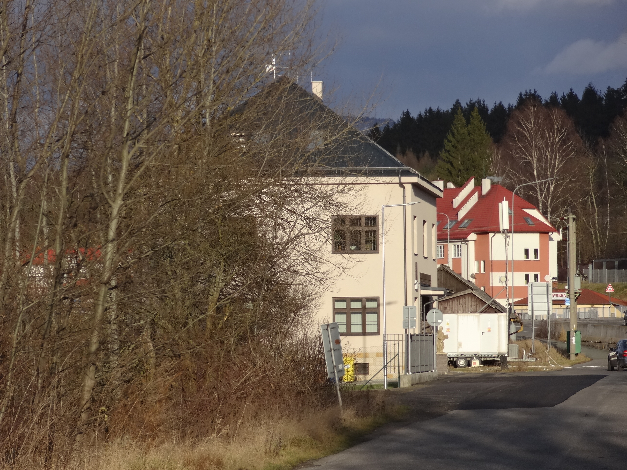 Běloves (Náchod) - u hraničního přechodu